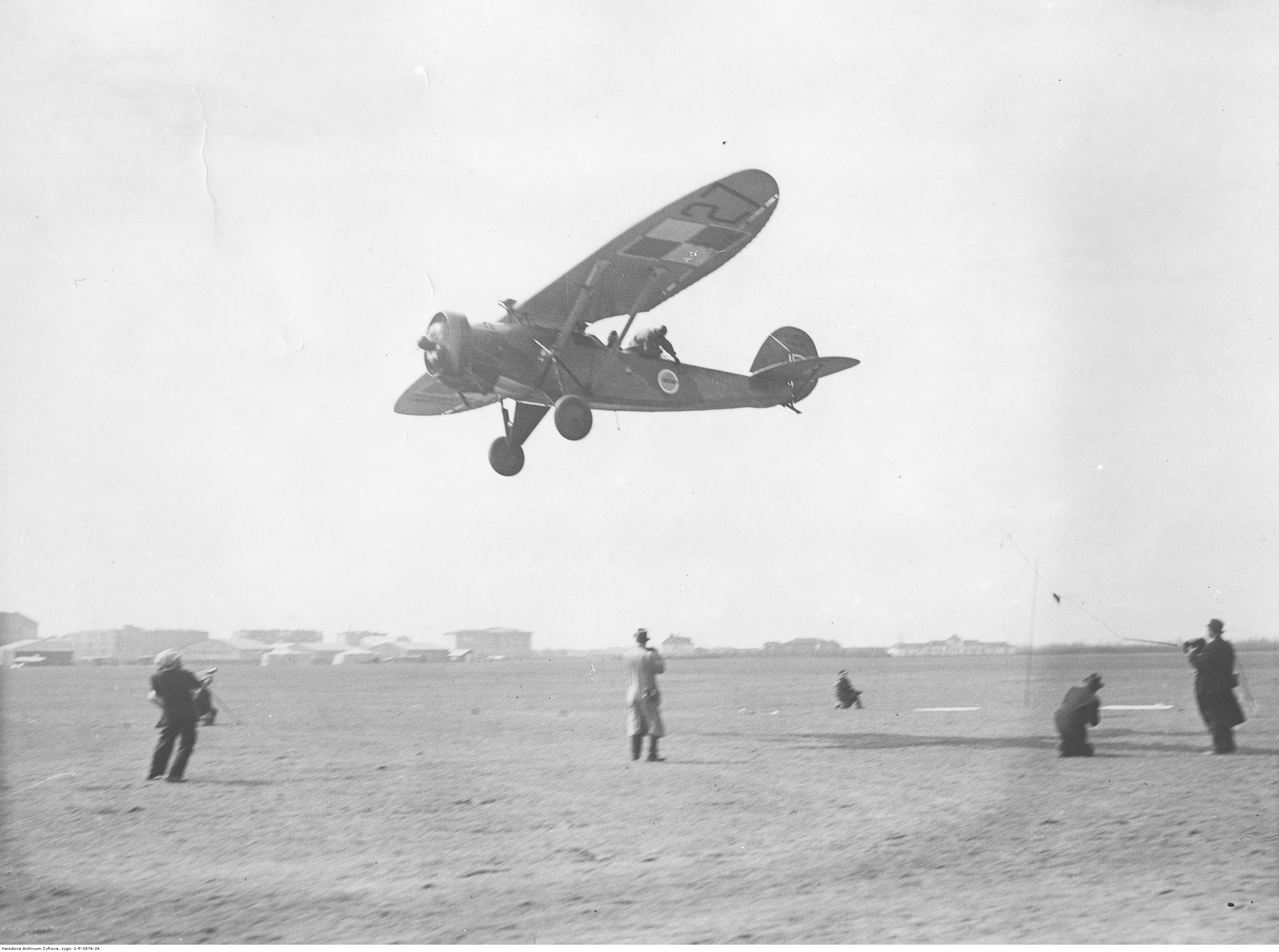 Samolot łącznikowy Lublin R.XIII zabiera meldunek przyczepiony na rozpiętych drutach na Polu Mokotowskim podczas rewii wojskowej z okazji rocznicy uchwalenia Konstytucji 3 Maja.